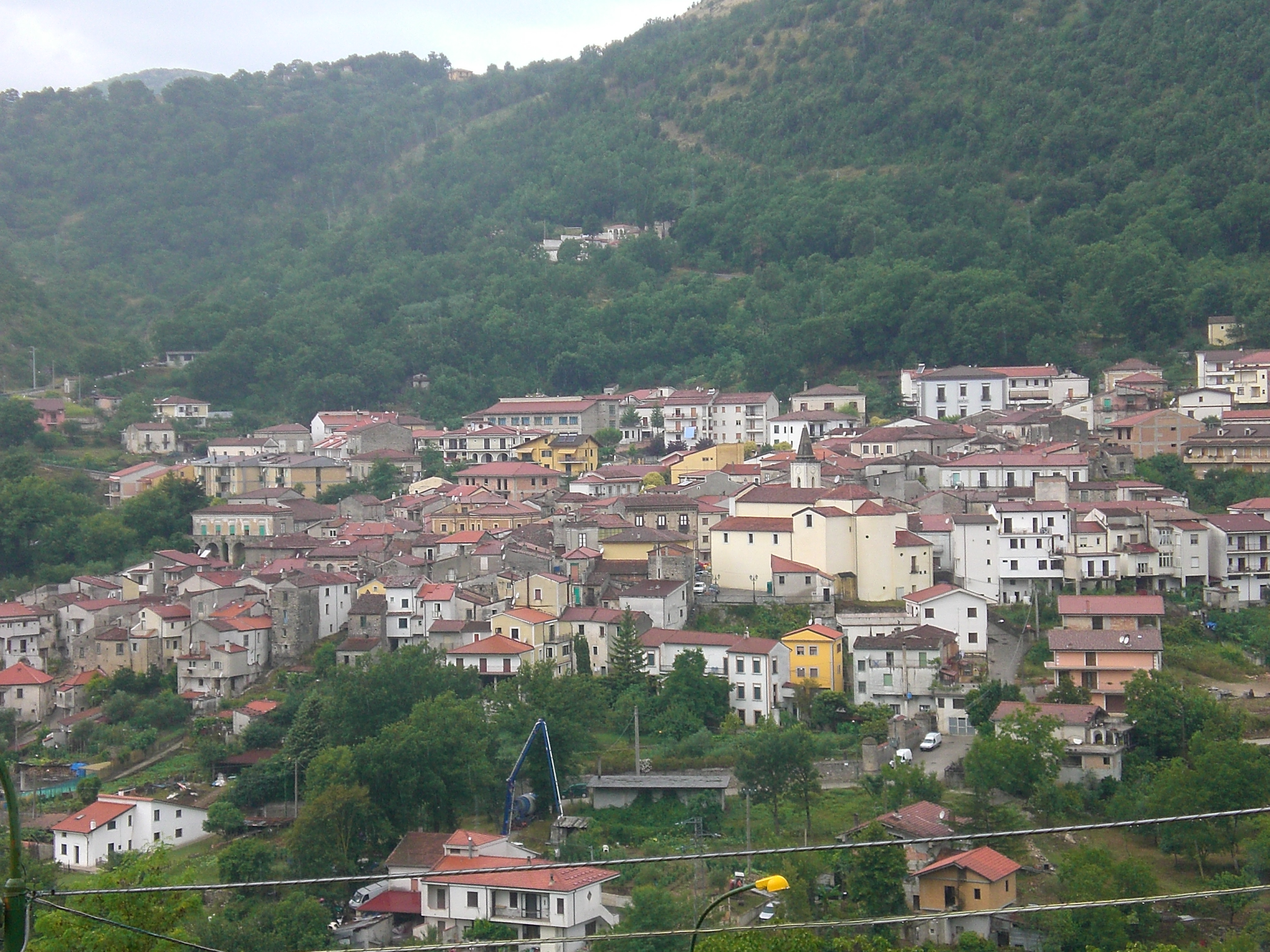 View of Casaletto Spartano